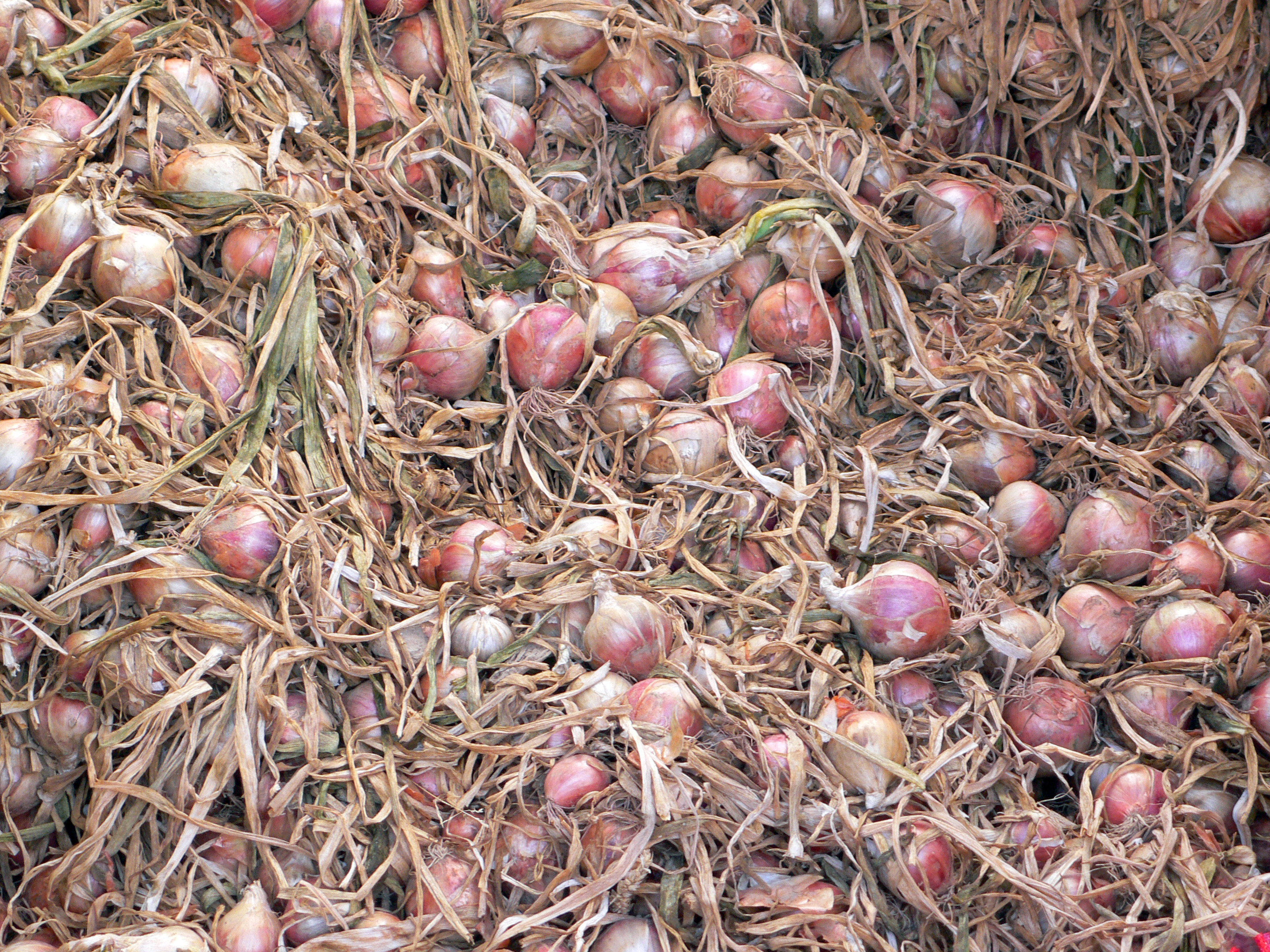 Des oignons rosé de Roscoff en vrac